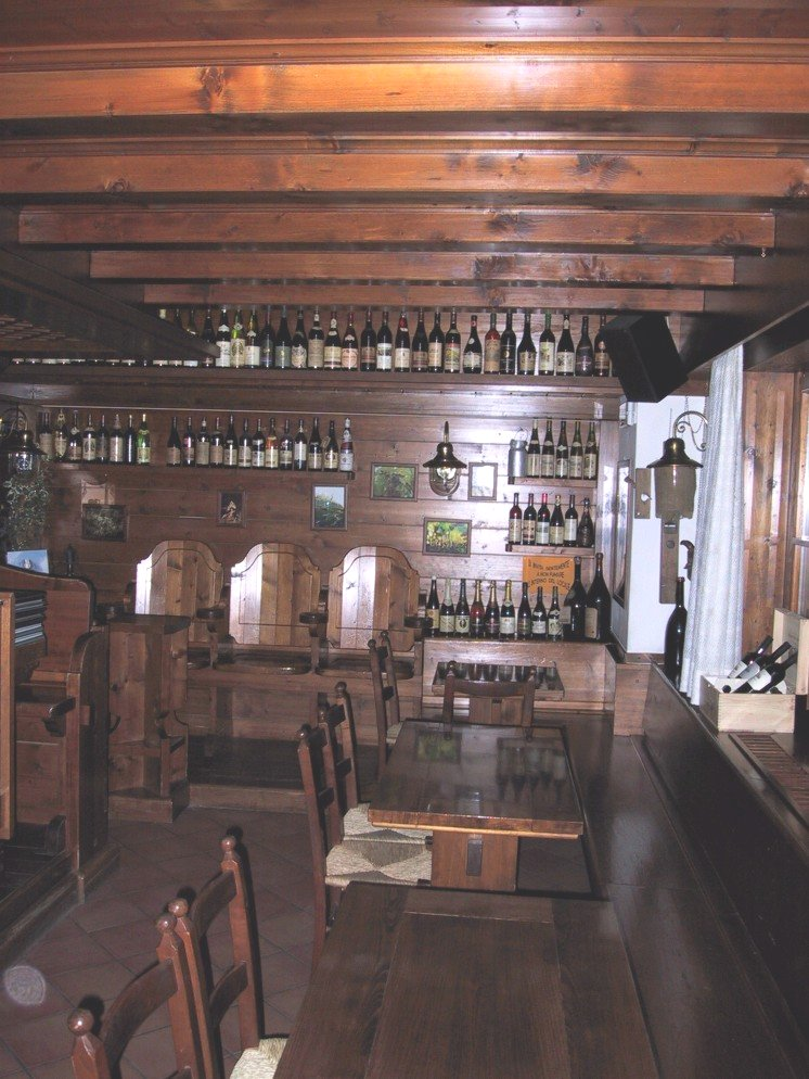 Enoteca in Tambre (Provinz Belluno), IT.